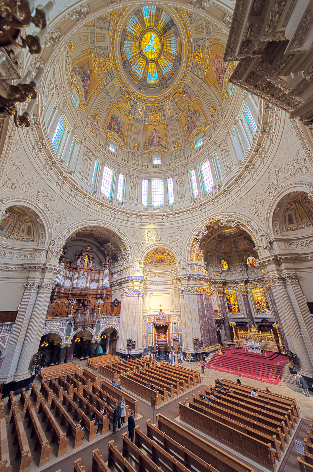 Berliner Dom (HDR)